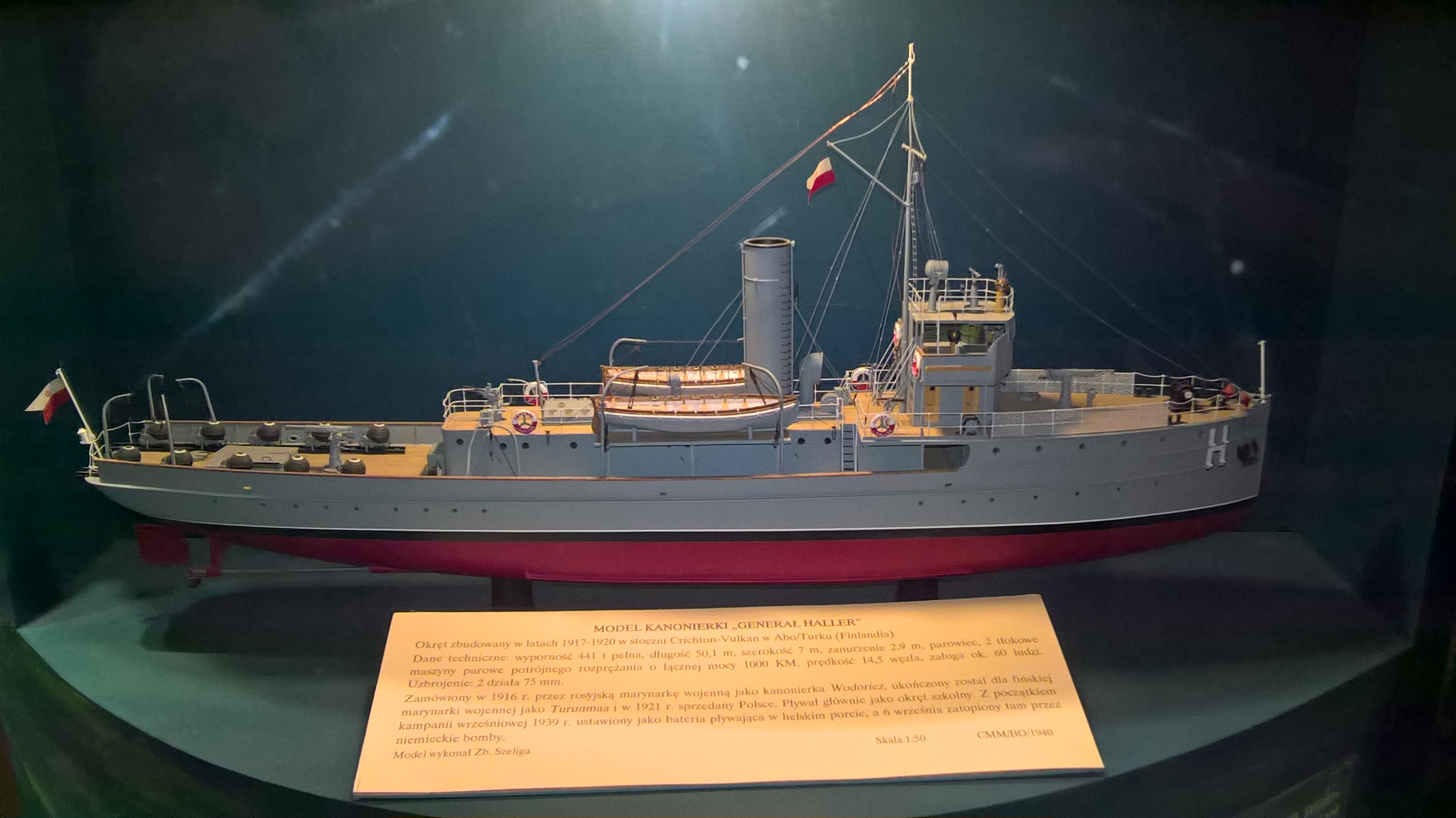 Model polskiej kanonierki ORP "Generał Haller", eksponowany w Narodowym Muzeum Morskim w Gdańsku.